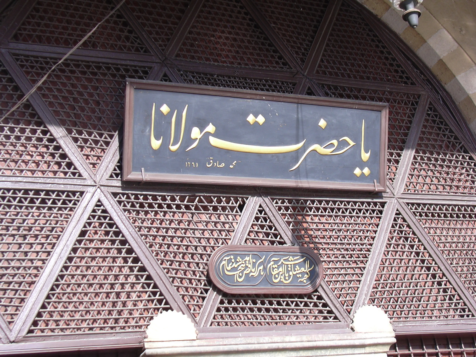 Dzseláleddin Rúmi sírjának bejárata